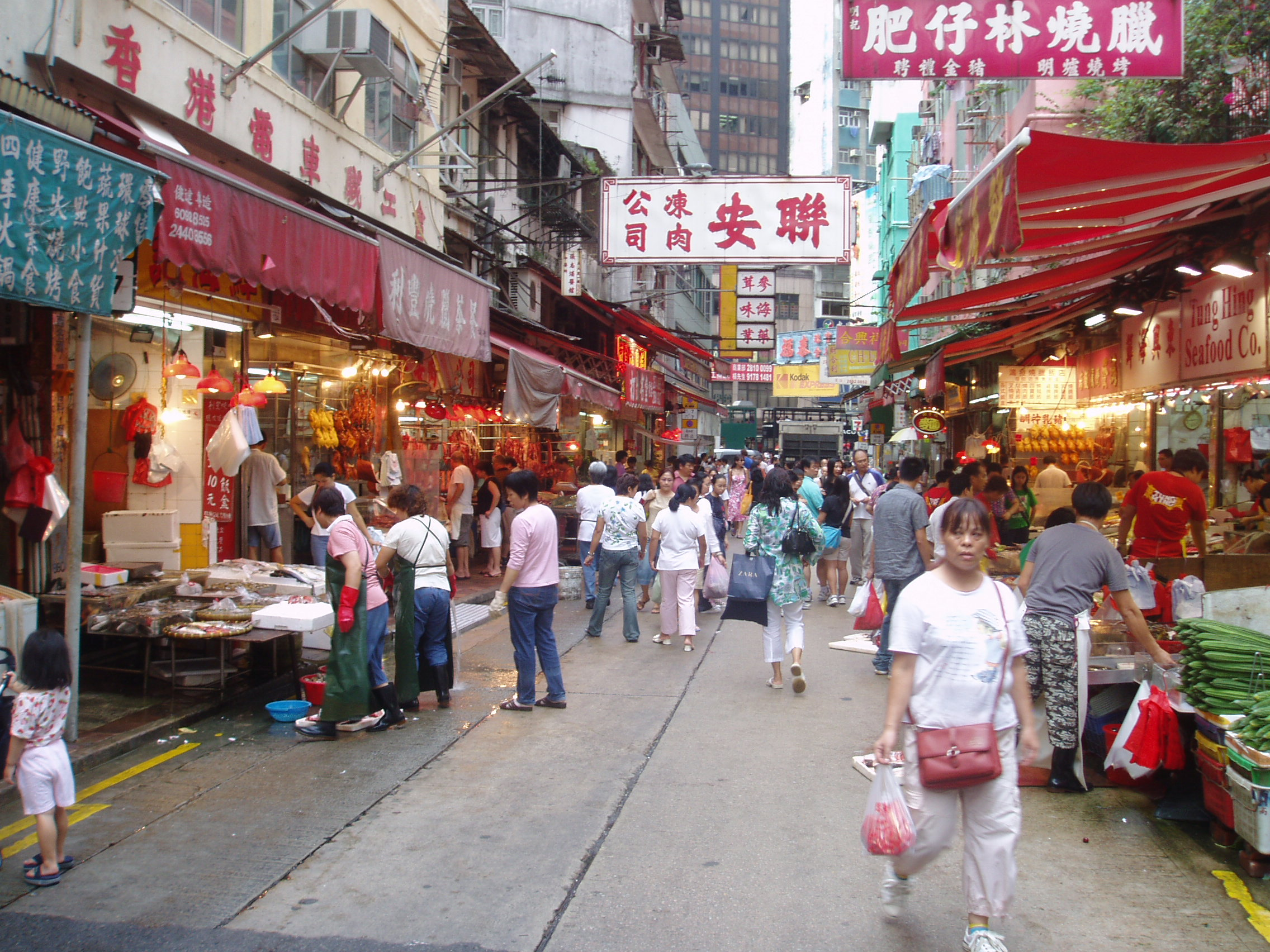 Merk yn in lytse strjitte.